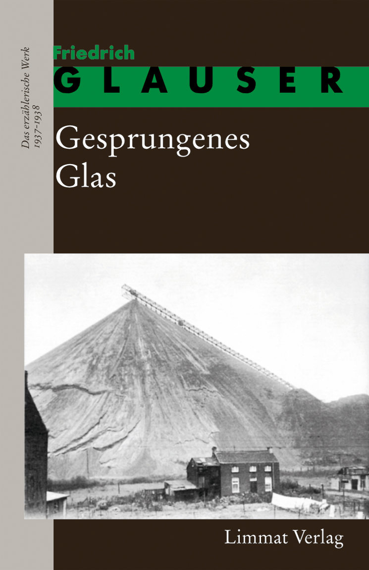 Cover von "Gesprungenes Glas- Erzählungen 4" (Werkausgabe des Limmat Verlages)